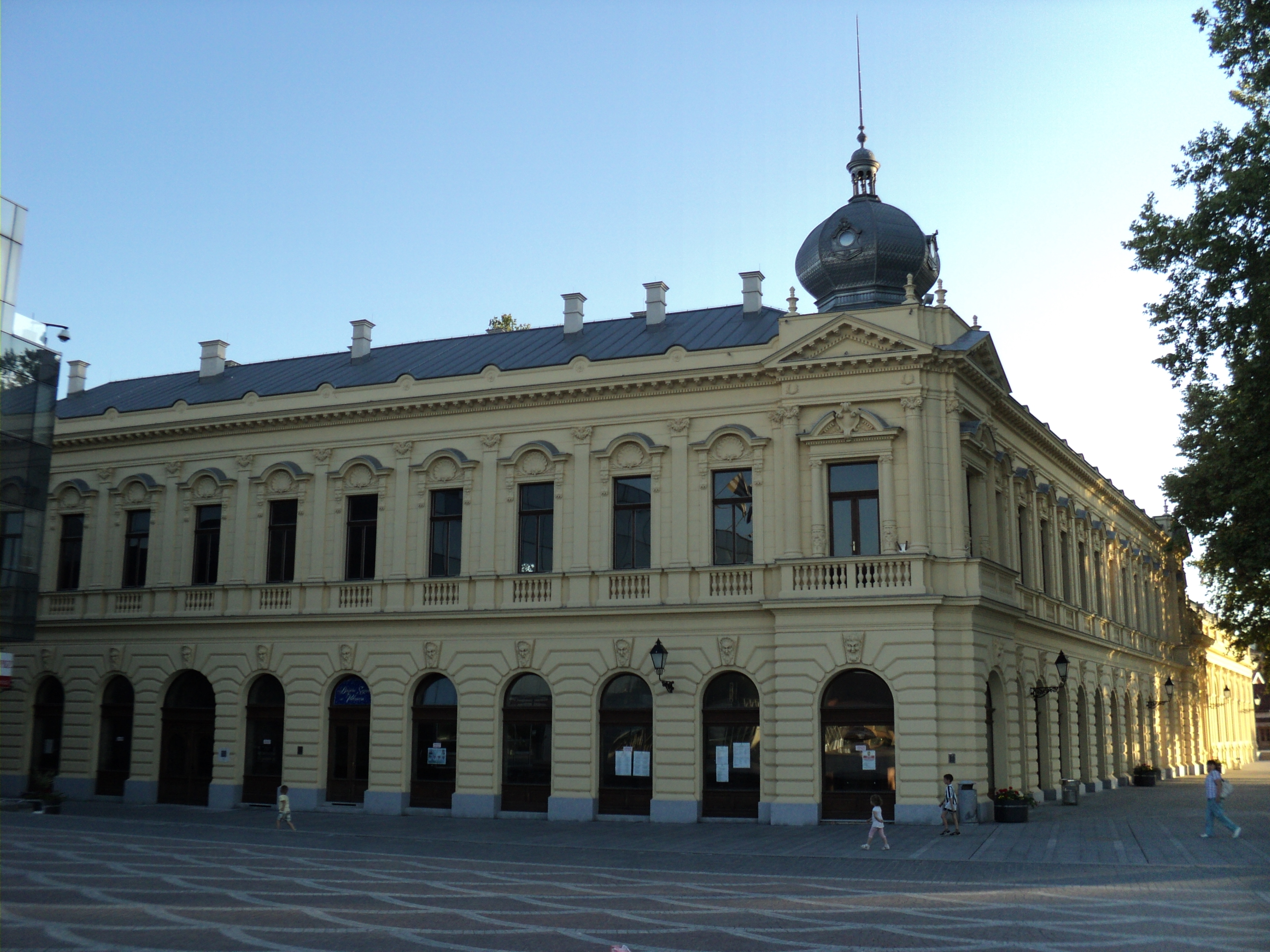 Zgrada Radničkog doma u centru Vukovara. Project was done by architect Vladimir Nikolić.